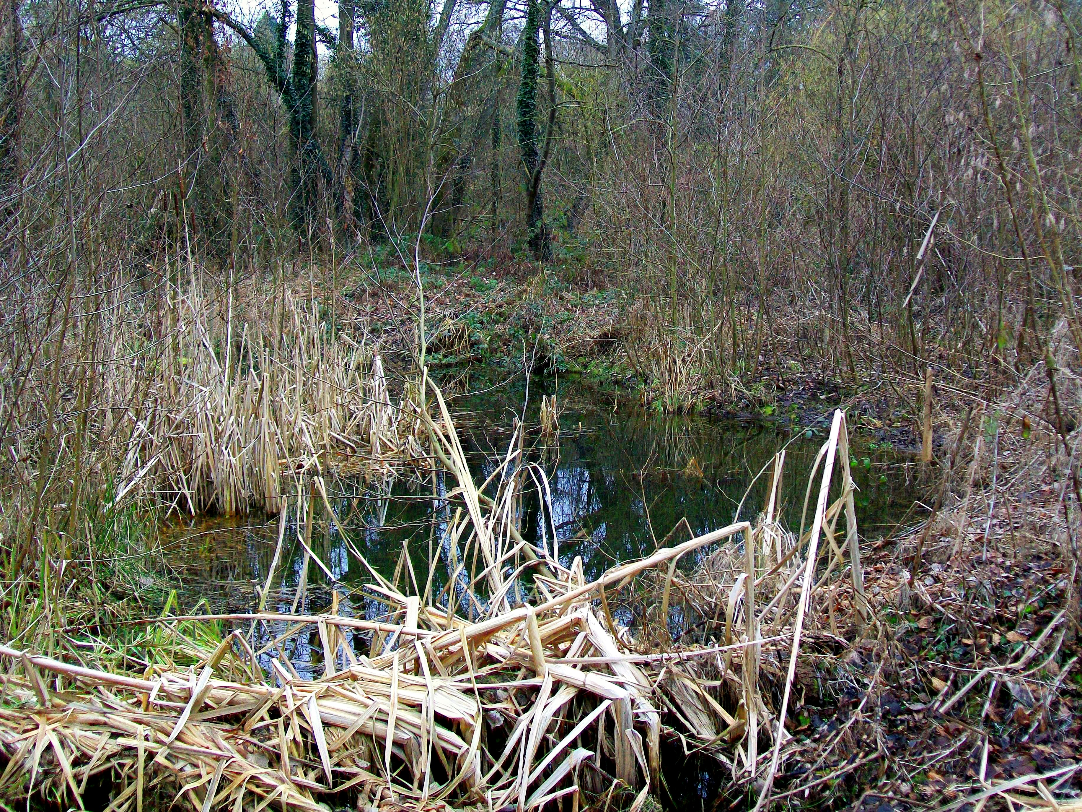 Le bois humide du Plessis-Luzarches, classé en espace naturel sensible (ENS) d’intérêt local depuis 2003. D'une surface d'un hectar seulement, il abrite tout de même 45 espèces d'oiseaux et 105 végétaux différents.